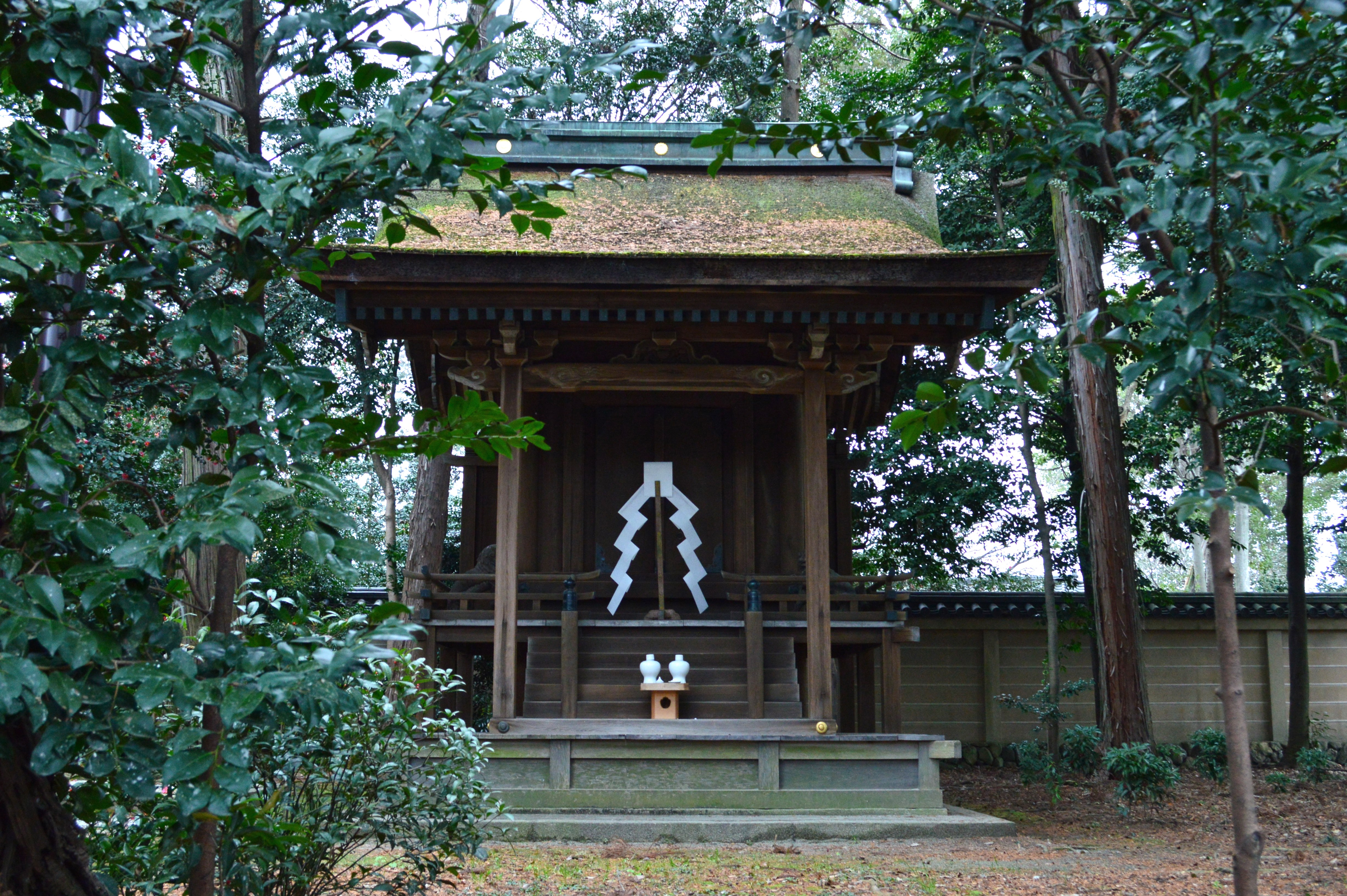 梅宮大社 若宮社